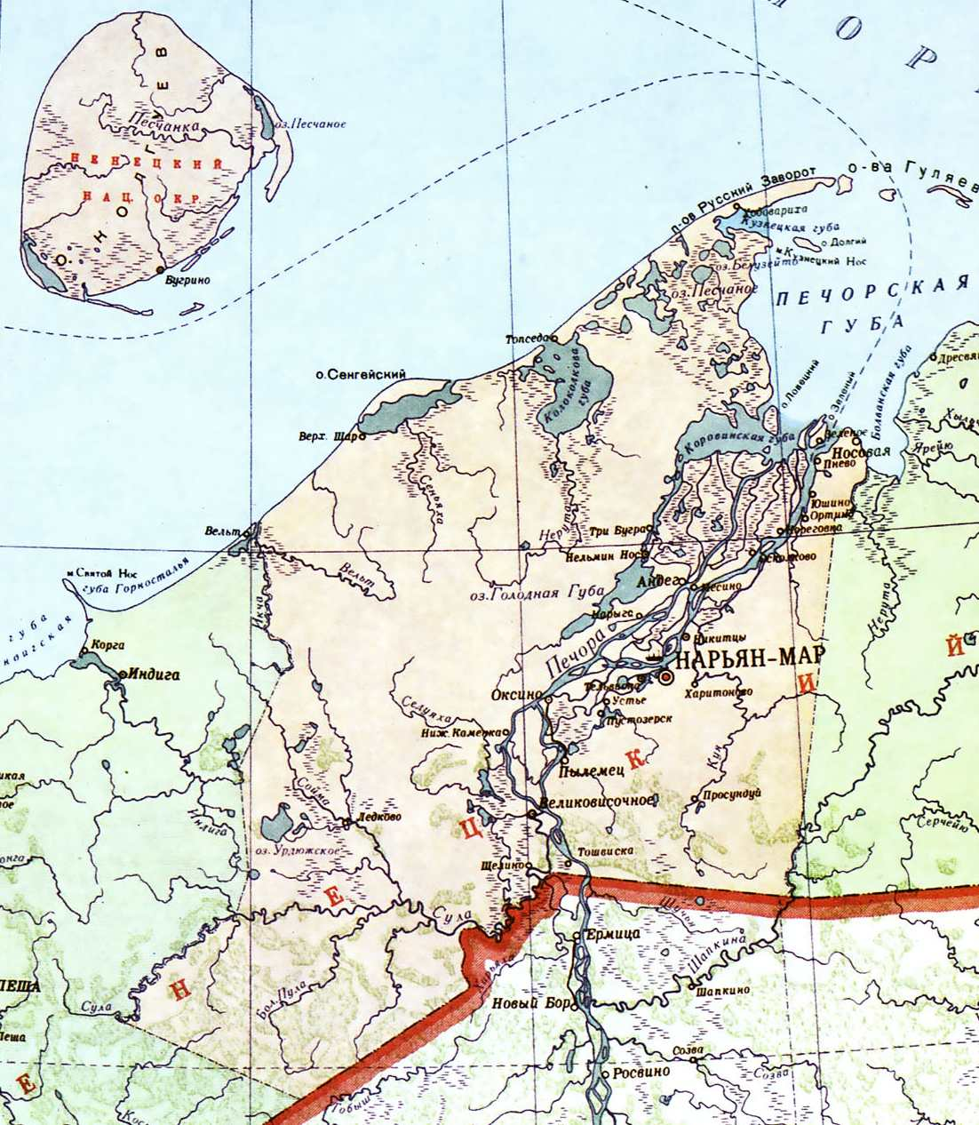 Карта Нижне-Печорского района.